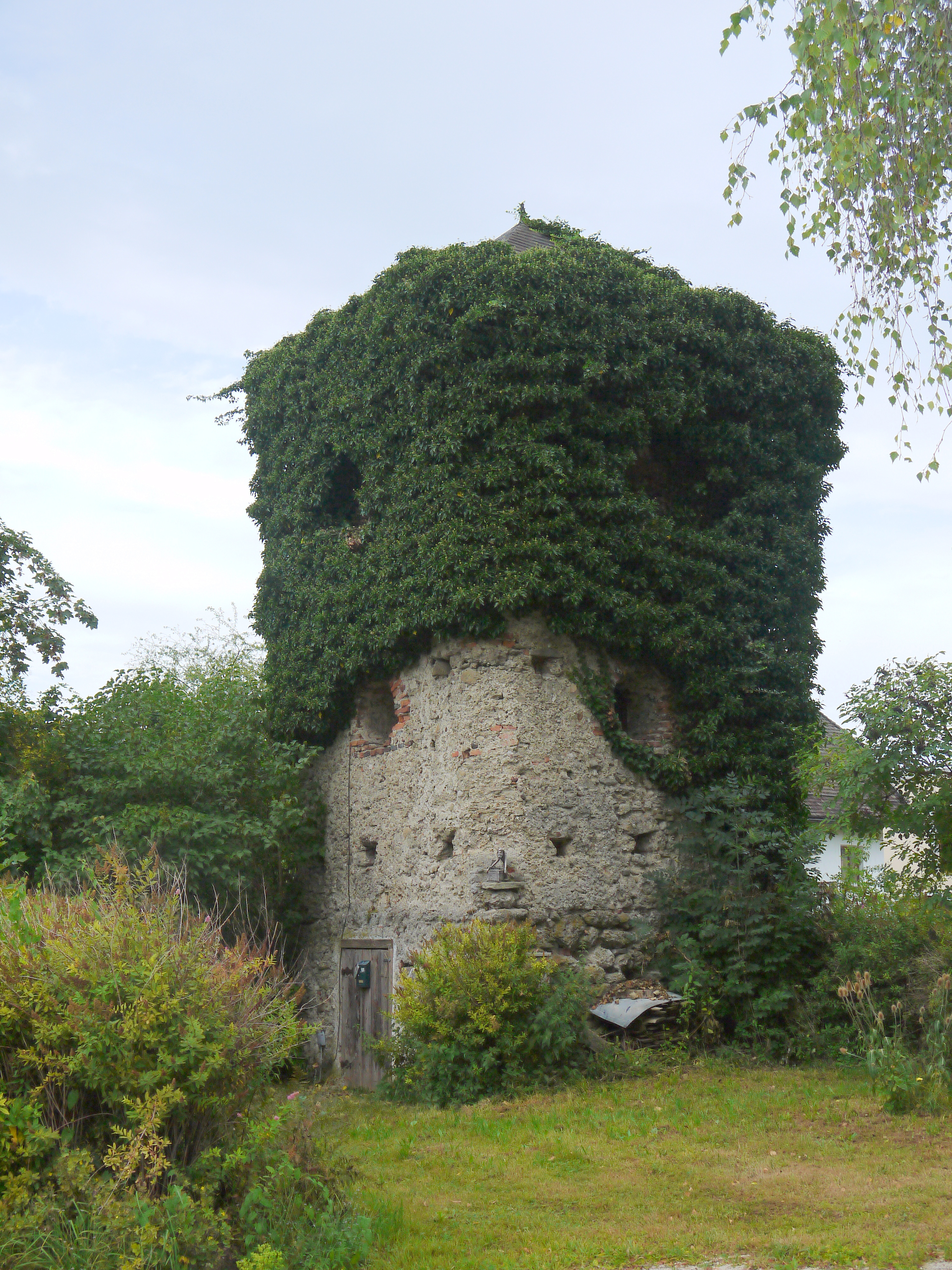 Schloss Walchen